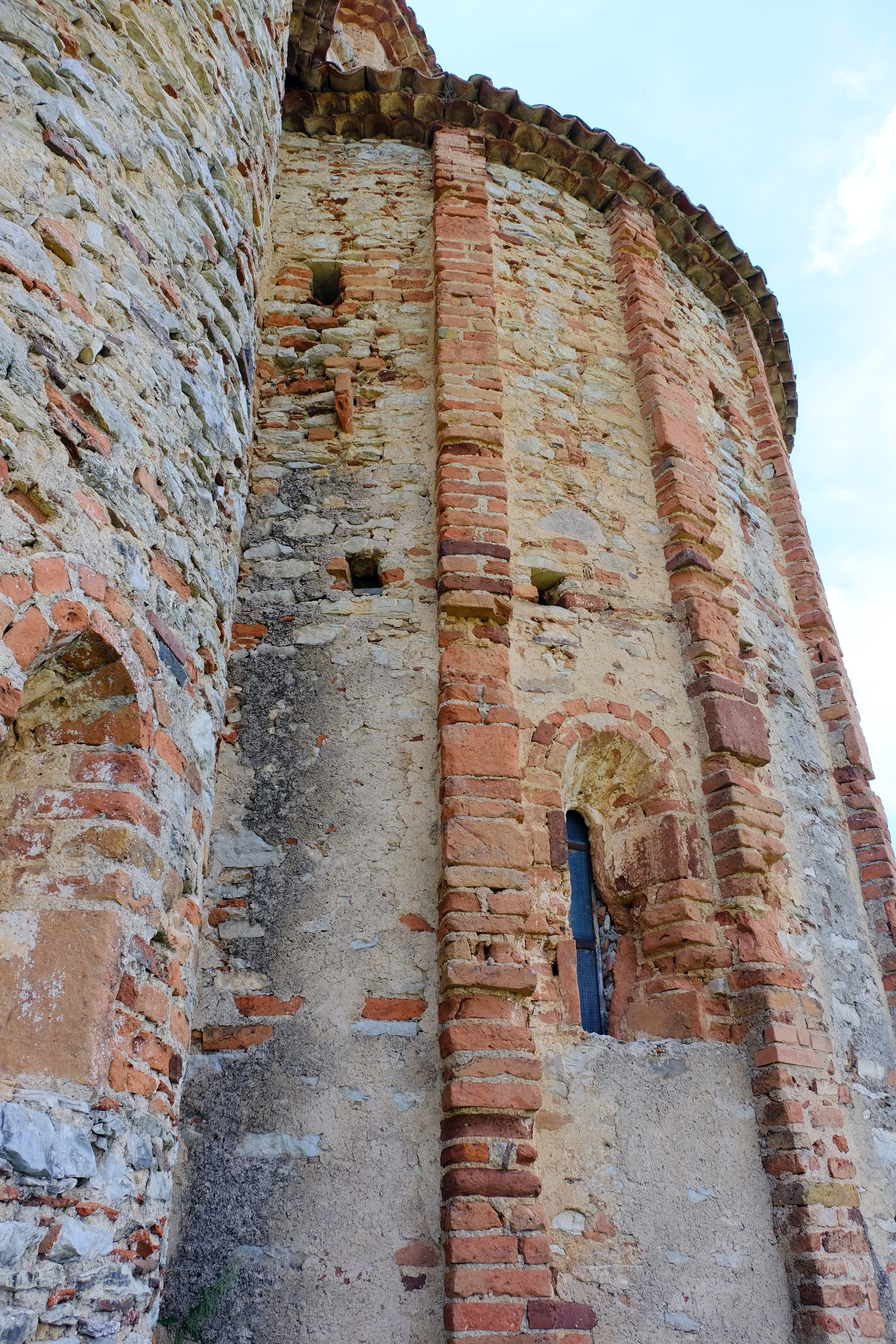 Convento di San Filippo di Fragalà